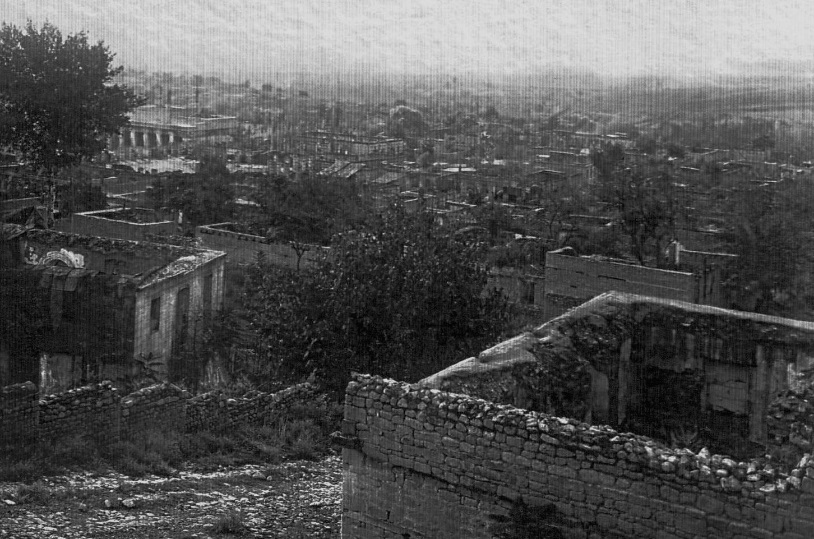 Şamaxı şəhərinin müsəlman hissəsinin ümumi mənzərəsi